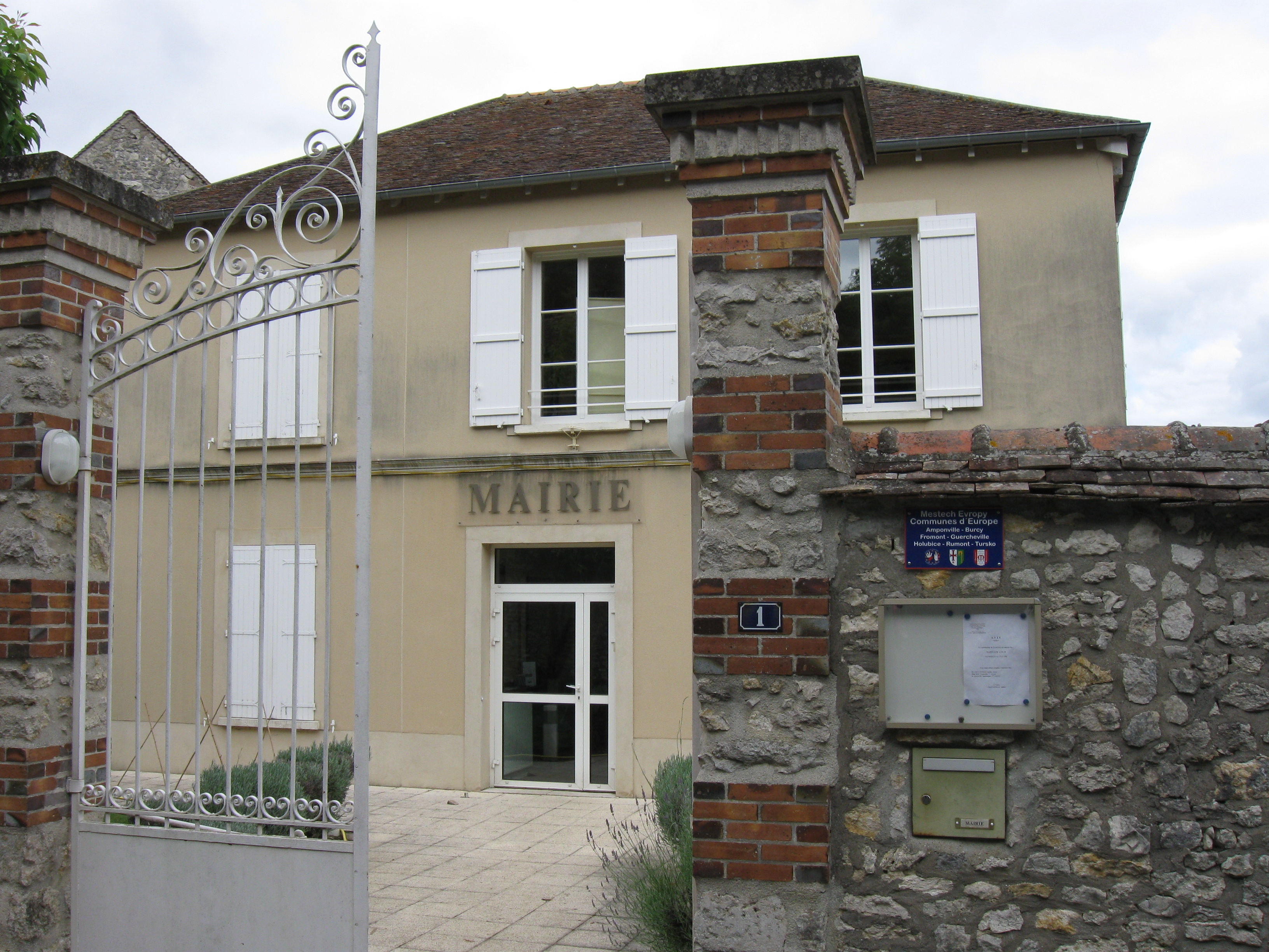 Mairie de Fromont. (département de Seine-et-Marne, région Île-de-France).